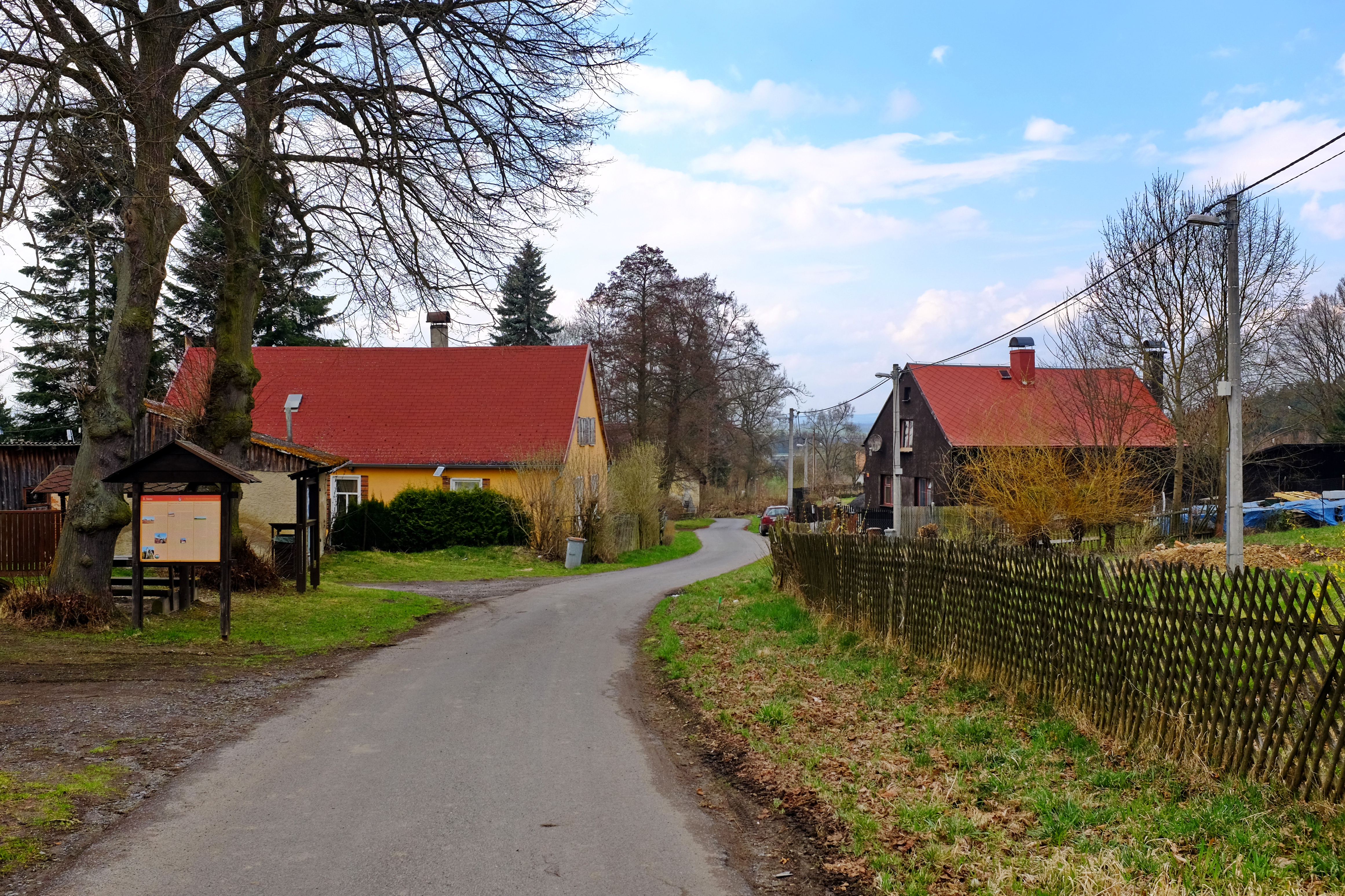 Štědrá, část obce Kynšperk nad Ohří, okres Sokolov